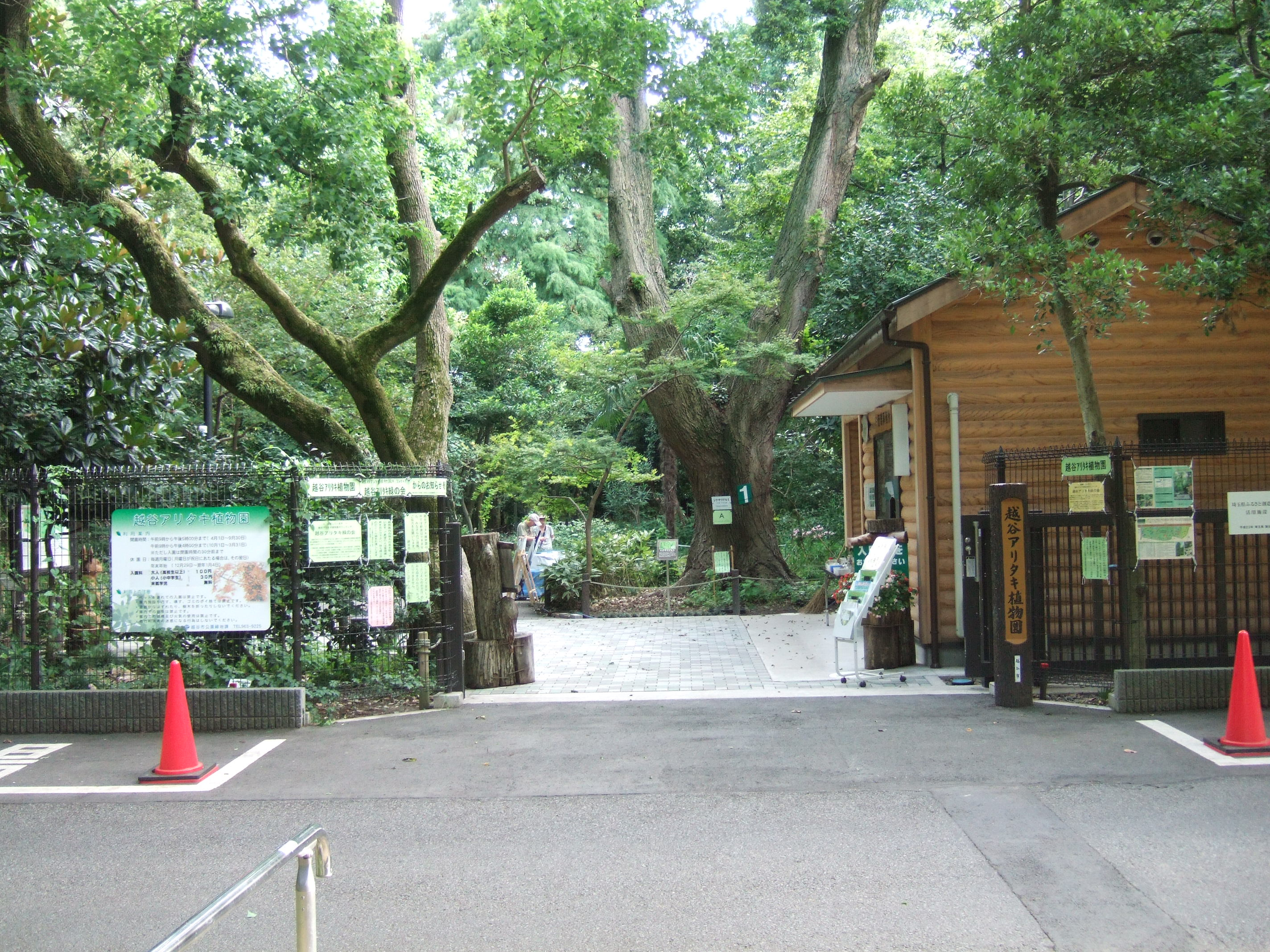 越谷アリタキ植物園入口